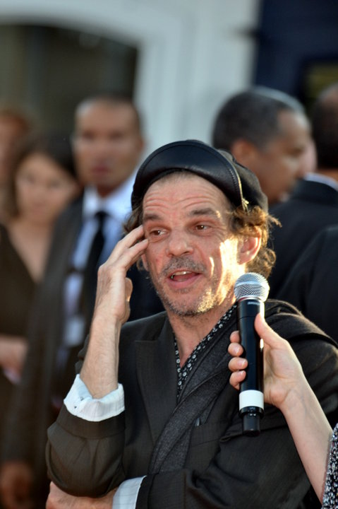 Denis Lavant au festival de Deauville